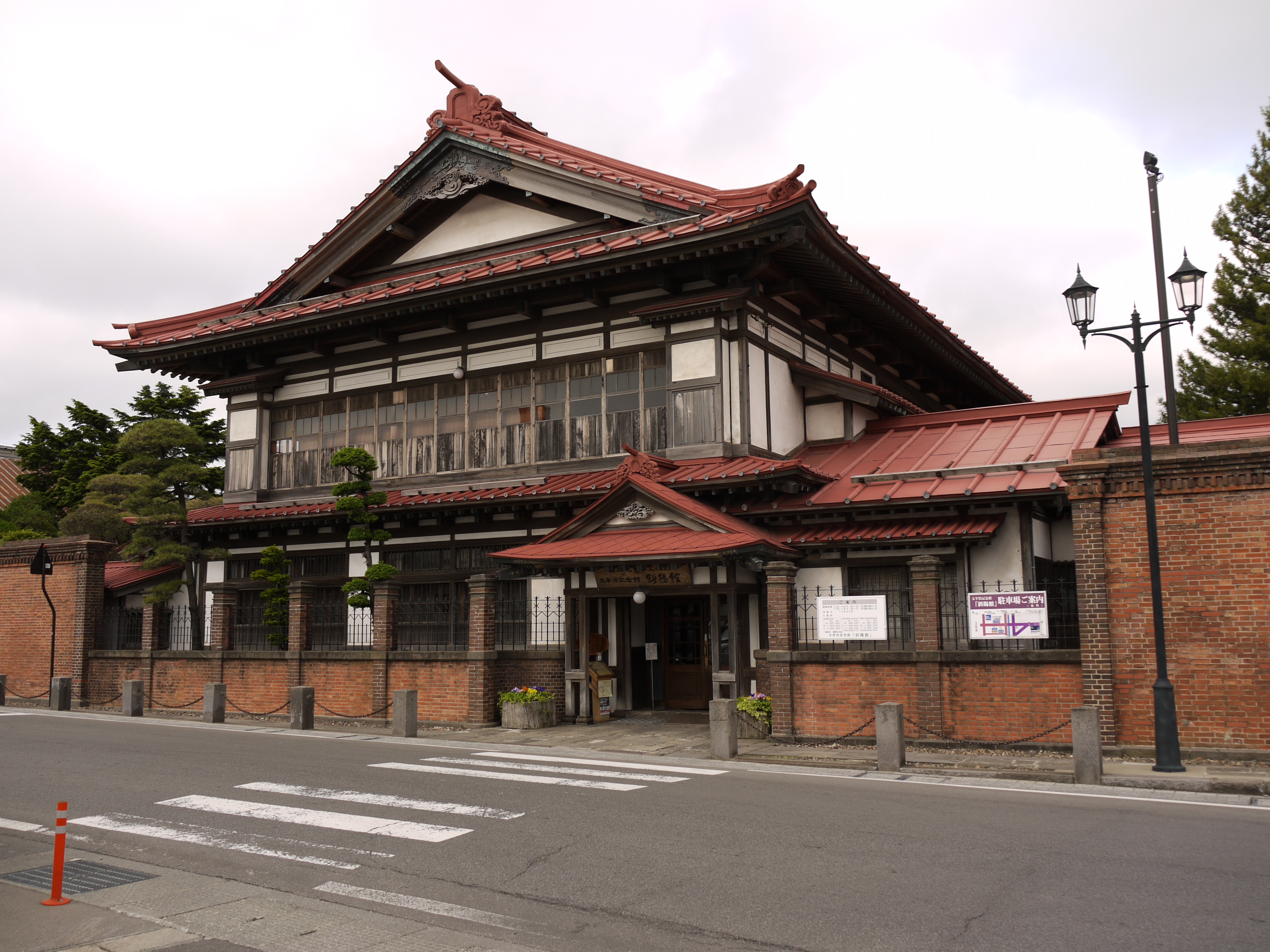 太宰治記念館 「斜陽館」全景